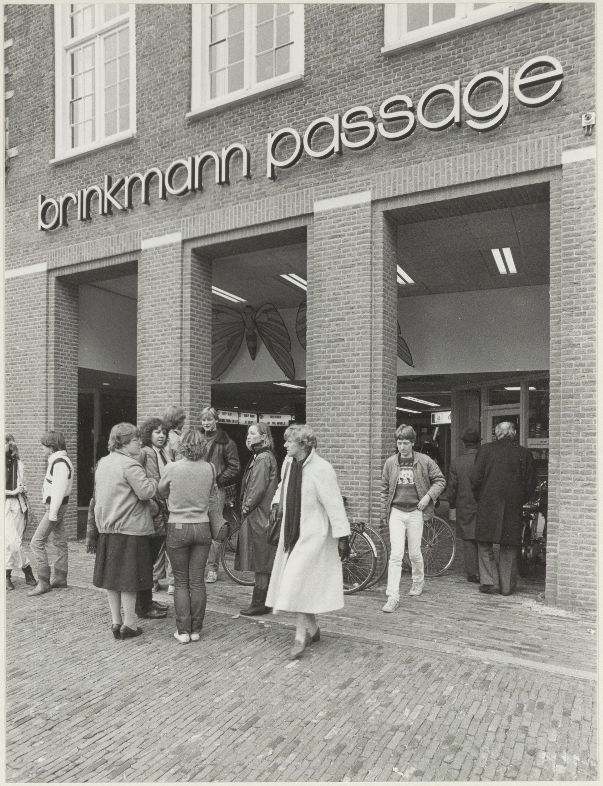 CollectieCollectie Fotoburo de BoerInventarisnummerNL-HlmNHA_54021402NL-HlmNHA_1478_21711kBeschrijvingDe ingang van de Brinkmann Passage aan de Grote Markt.FotonummerNL-HlmNHA_1478_1383DocumenttypeTopografische prenten, tekeningen en foto'sVervaardigerBoer, Cees de (1918-1985) Soort vervaardigerFotograaf AnnotatiesC56-2Zie ook: Jaarboek Ver. Haerlem 1982, blz. 168LandNederland ProvincieNoord-Holland GemeenteHaarlem PlaatsHaarlem StraatGrote Markt GeografischCentrum Begindatum1982Einddatum1982TechniekFoto TrefwoordenStraatgezichten